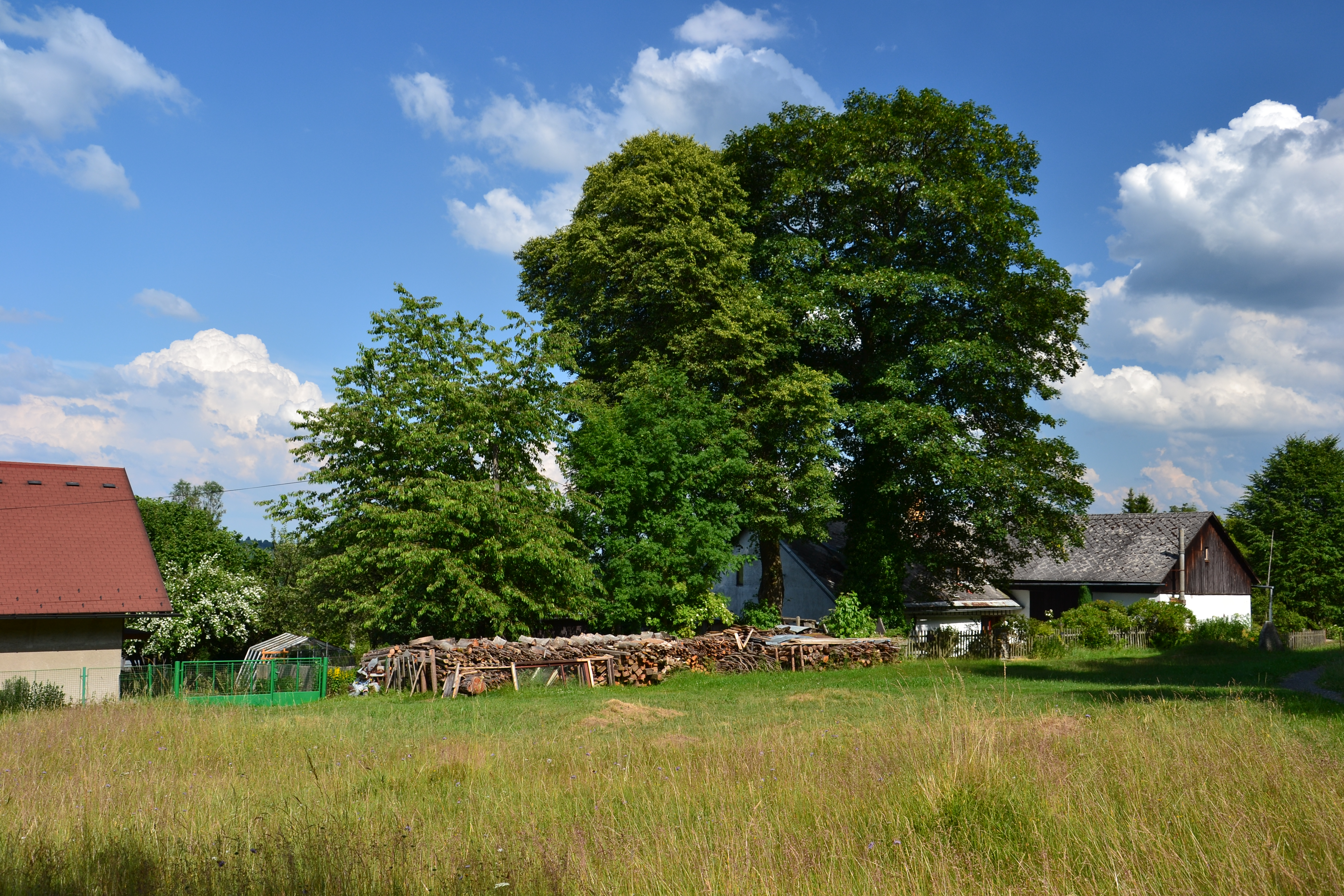 Přírodní památka Úbislav